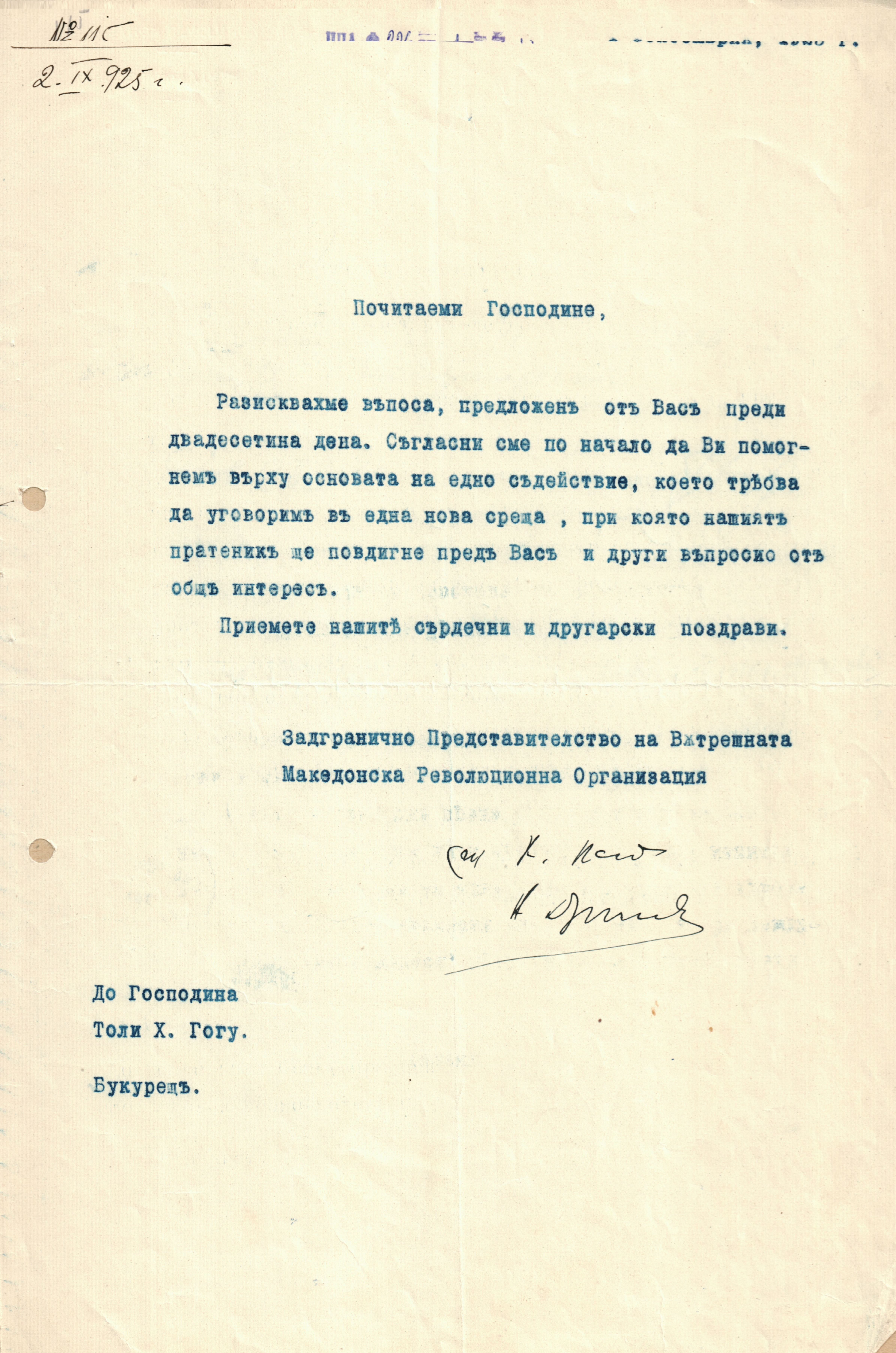 Писмо на Задграничното представителство на ВМРО до Апостол Хаджигогу, подписано от К. Пандов (псевдоним на Кирил Пърличев) и Н. Дреновски (псевдоним на Наум Томалевски).